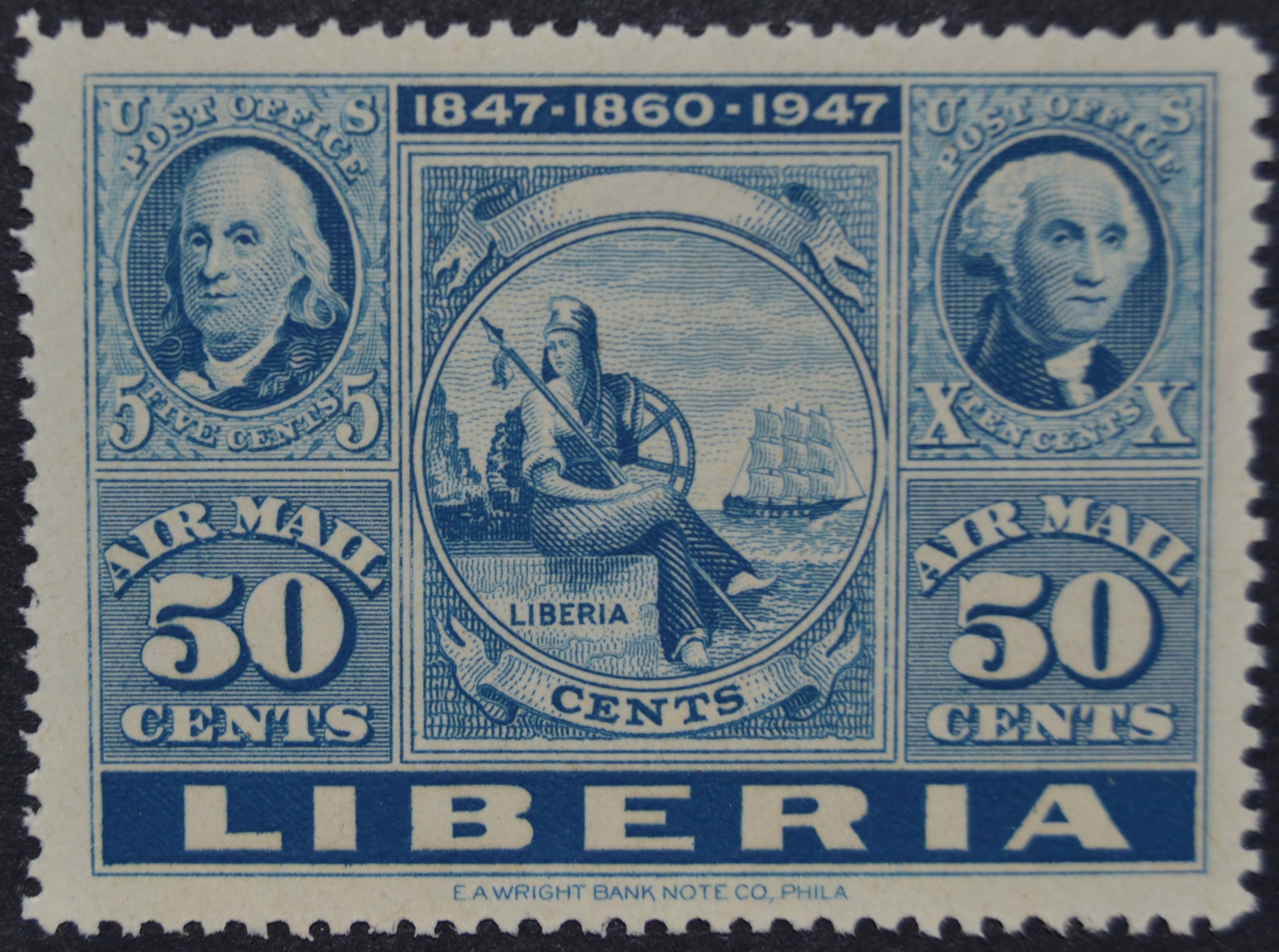 Selo de 50c da Libéria, emitido em 1947, para assinalar o 1º centenário do Serviço Postal dos EUA.